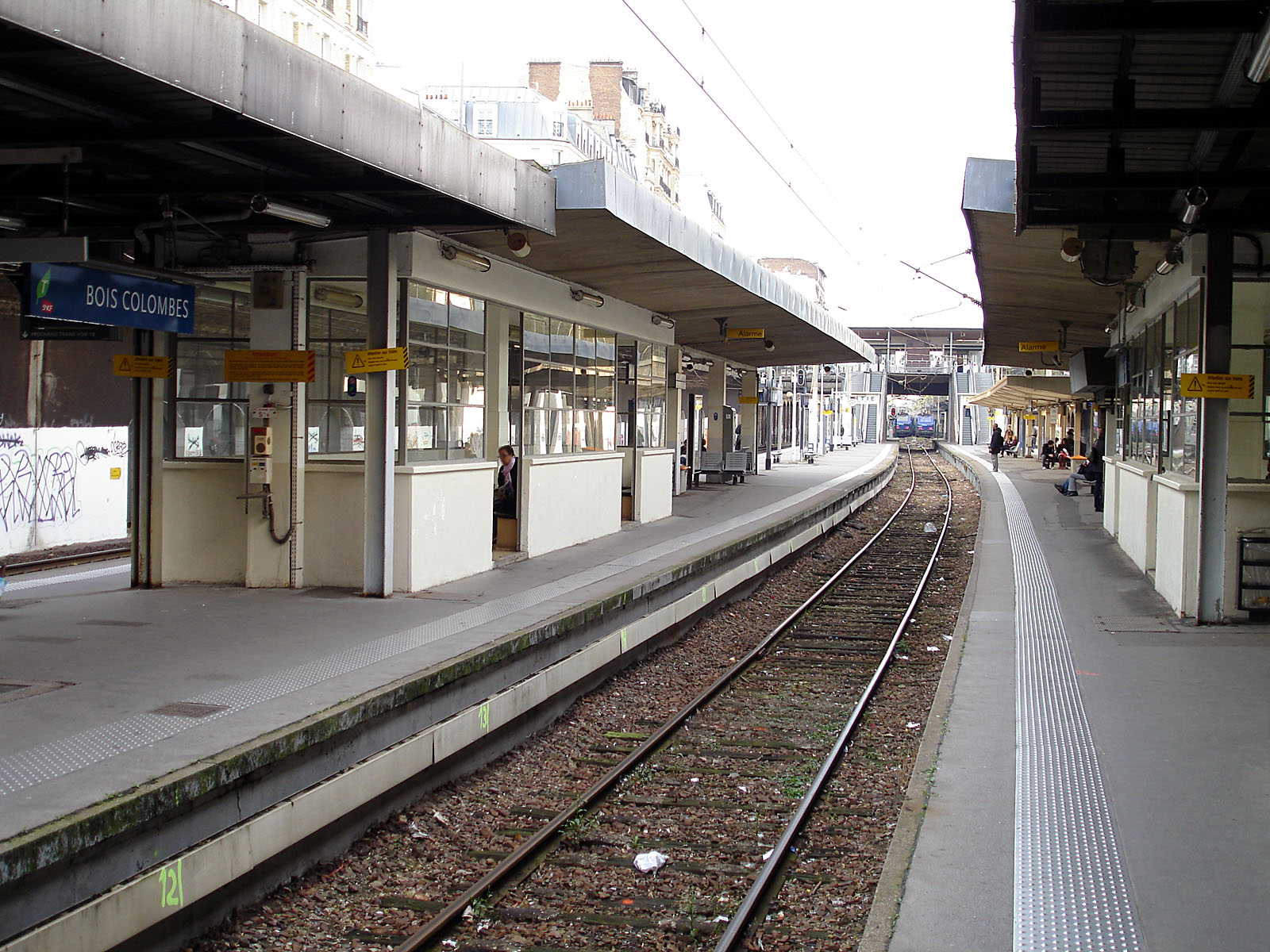 Voie centrale de la gare de Bois-Colombes, Hauts-de-Seine, France.